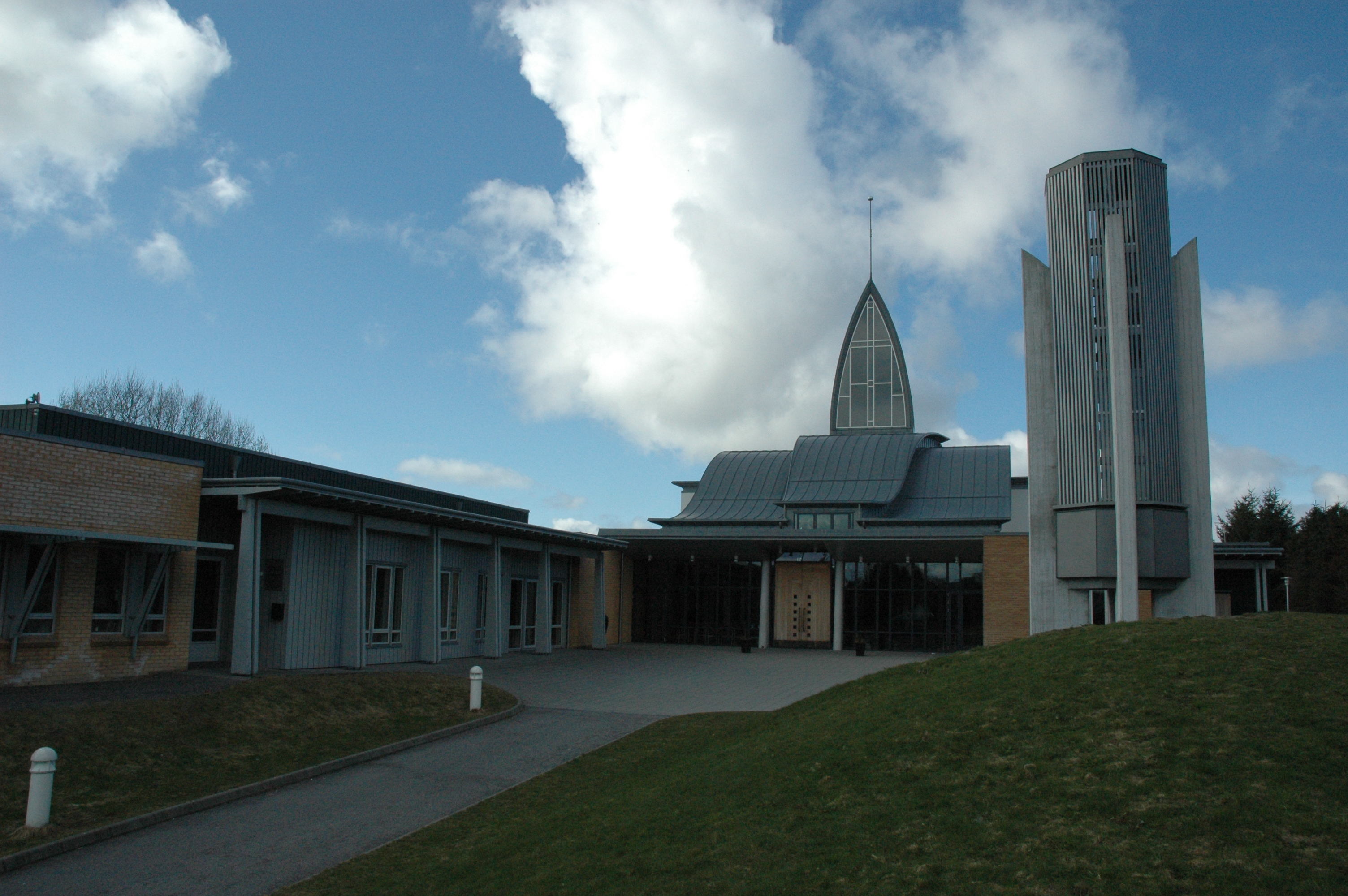 Udland kirke, Haugesund